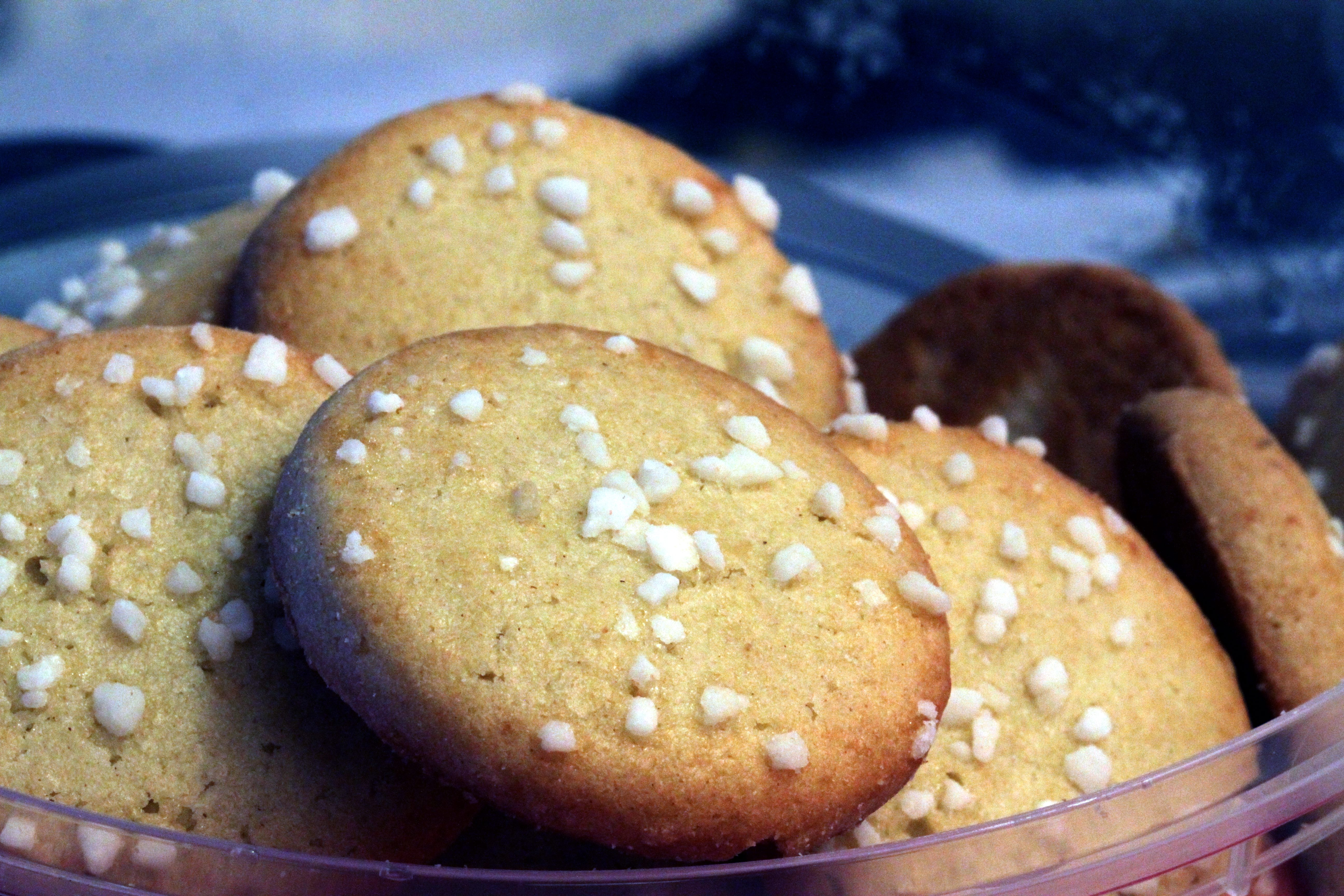 Serinakaker, type kjøpt i butikk.